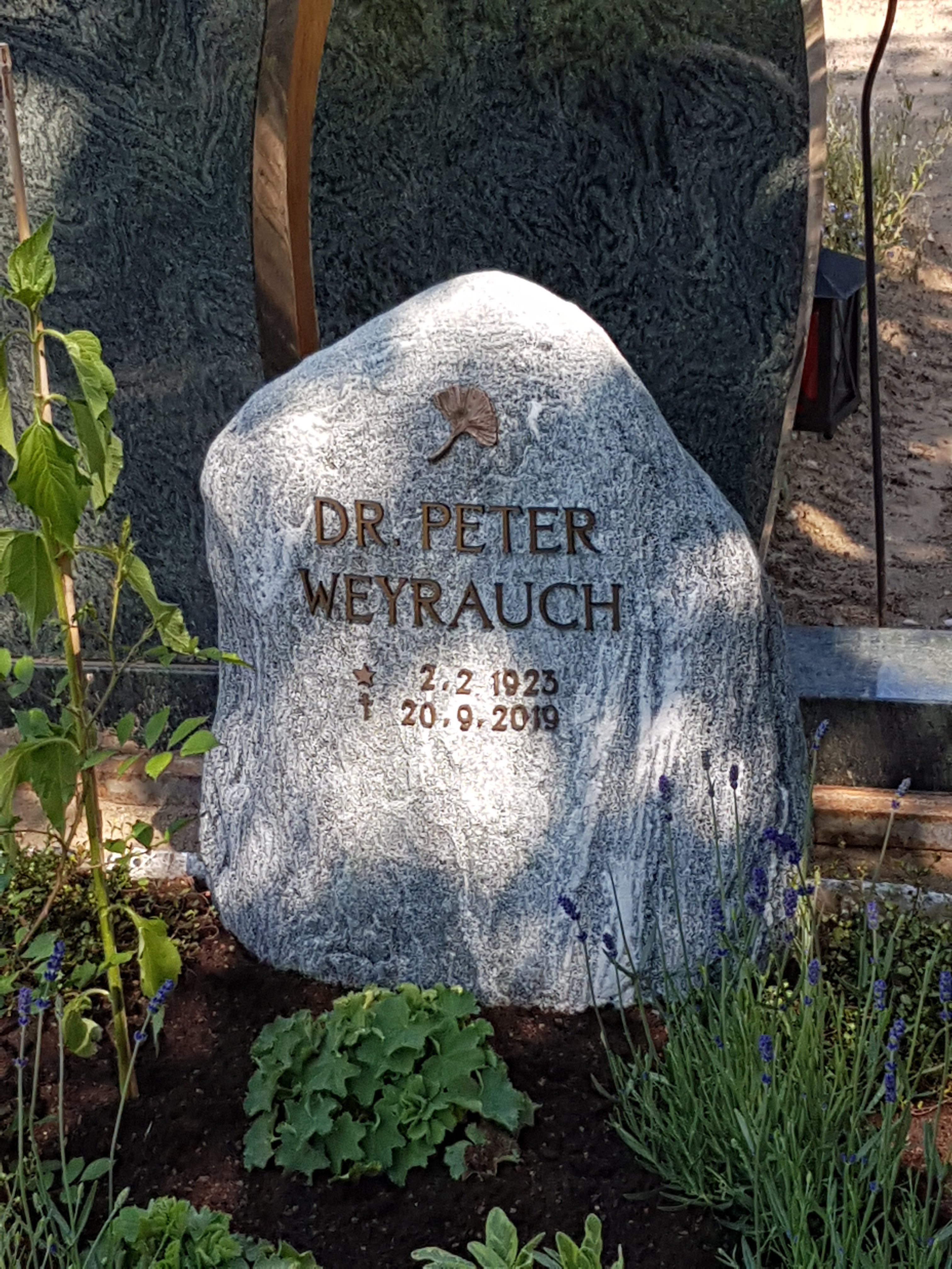 Grab des Architekten Peter Weyrauch